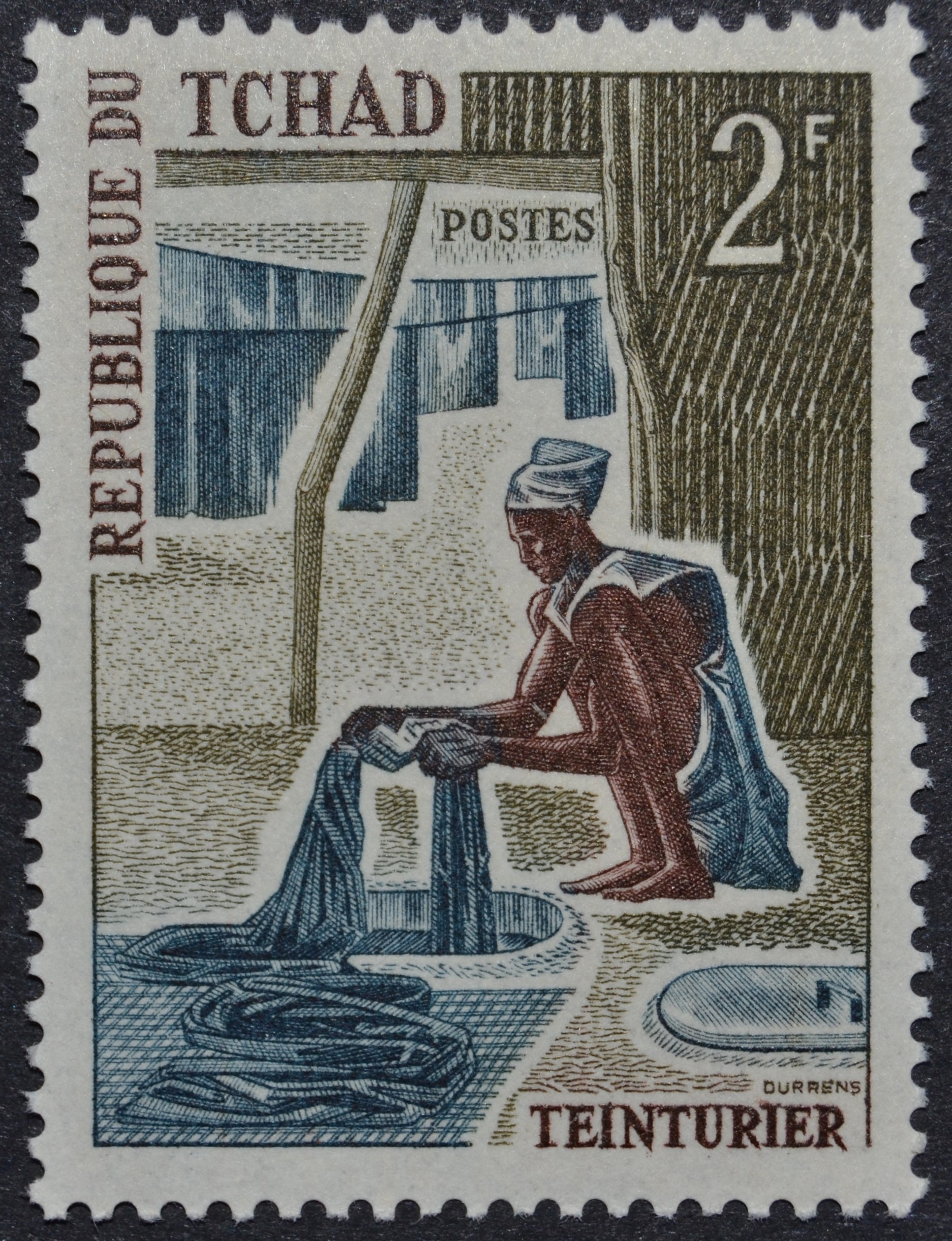 Selo do Chade, emitido em 1970, pertencente à série "Artesanato".